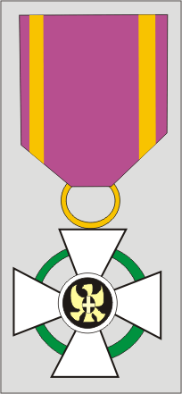 Crocce de l'Ordine Civile e Militare dell'Aquila Romana